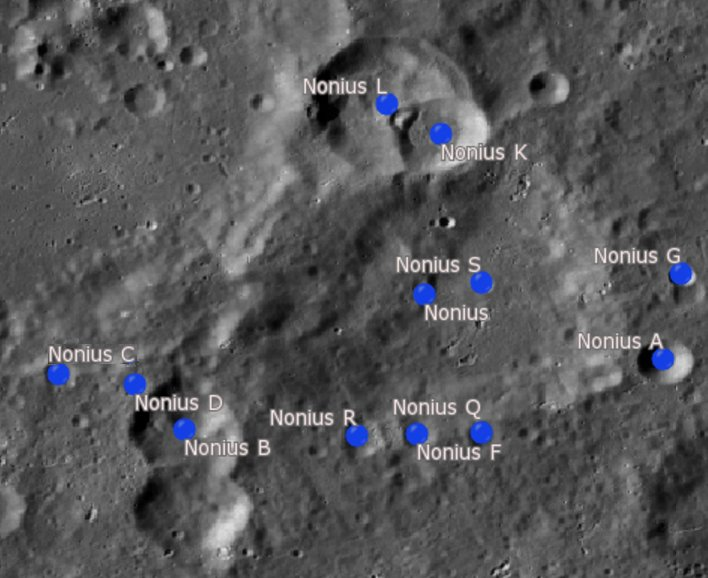 Cráter lunar Nonius. Cráteres satélite. (Imagen LRO)